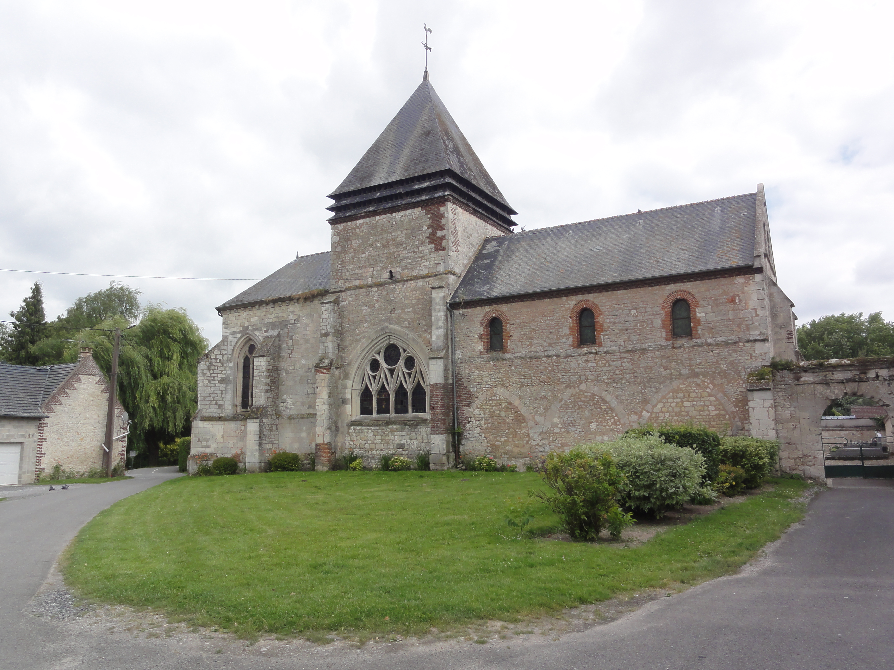 Vesles-et-Caumont (Aisne) église